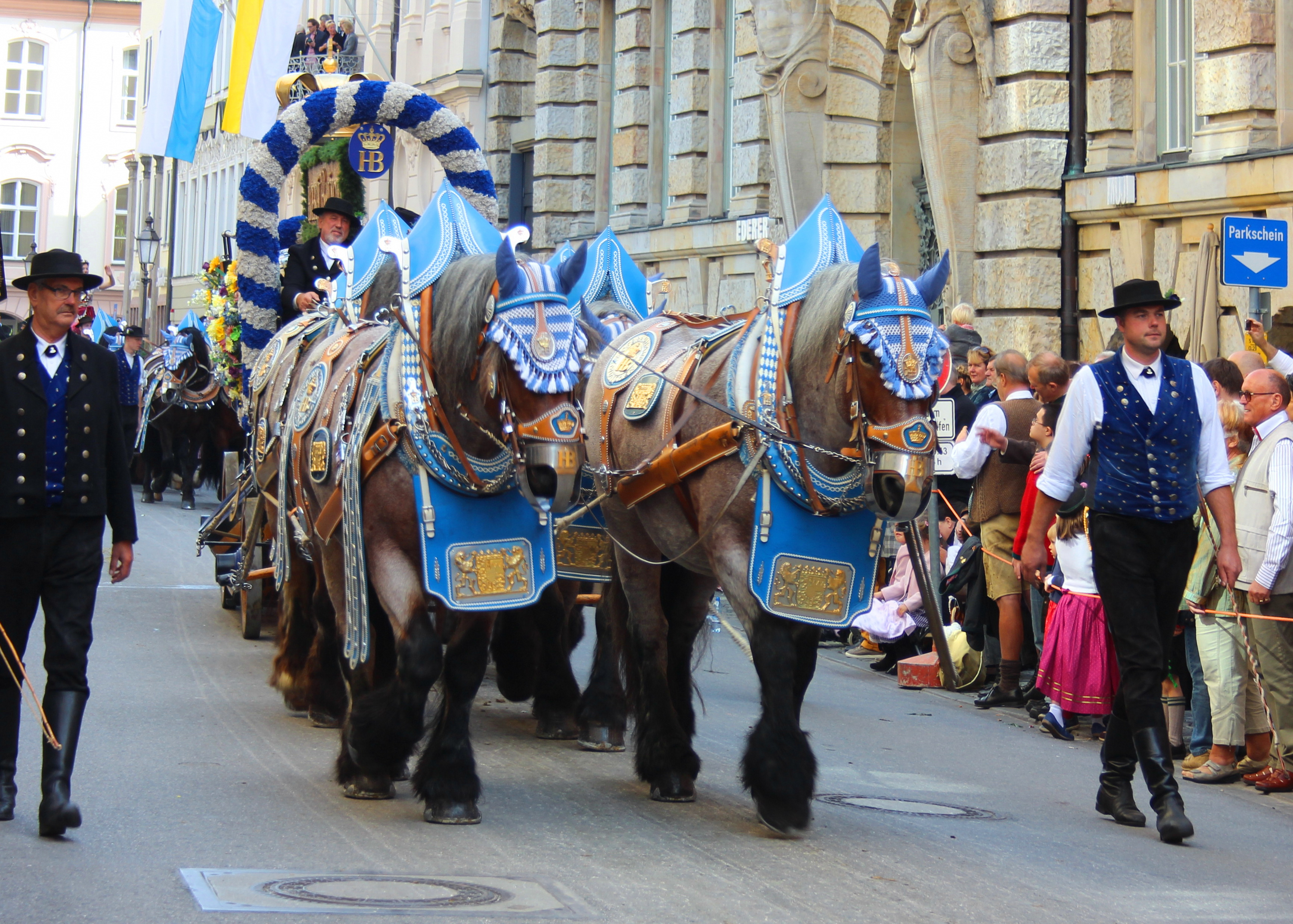 Bierpferdewagen der Hofbräubrauerei auf dem Trachten- und Schützenumzug in München